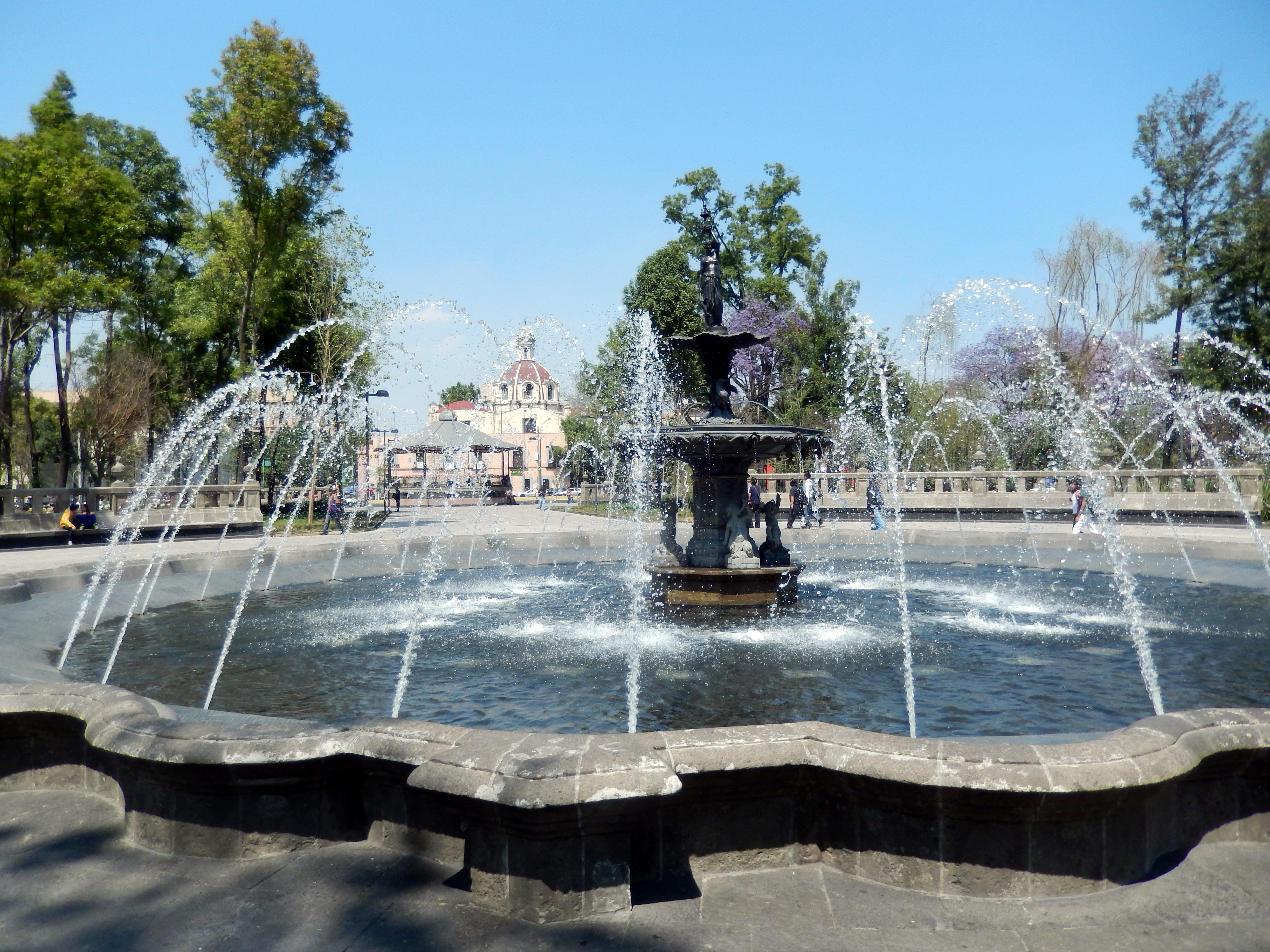 Fuente central de Parque Alameda